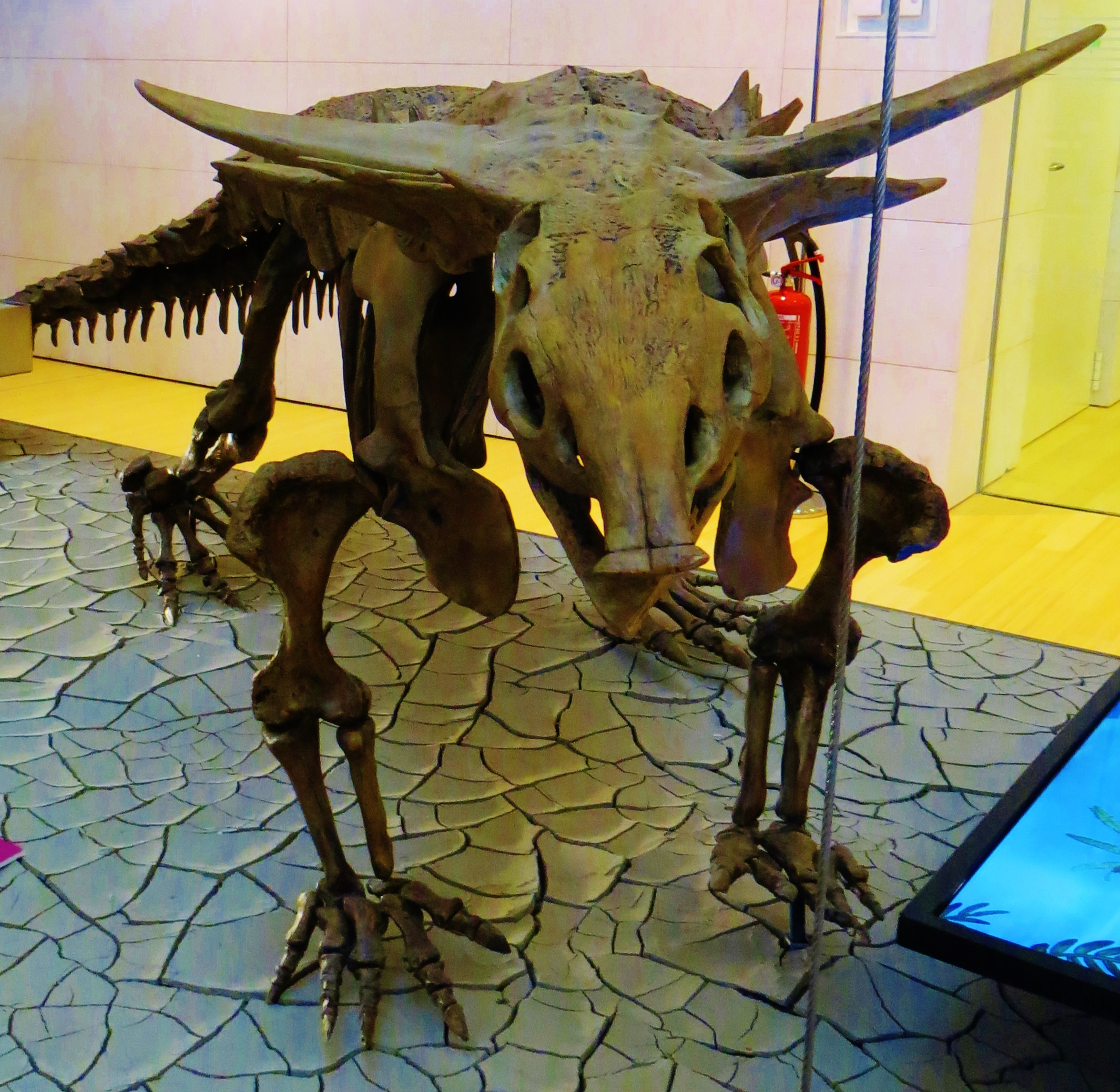 Fossil of Desmatosuchus, an extinct reptile- Took the picture at Muse (Trento)